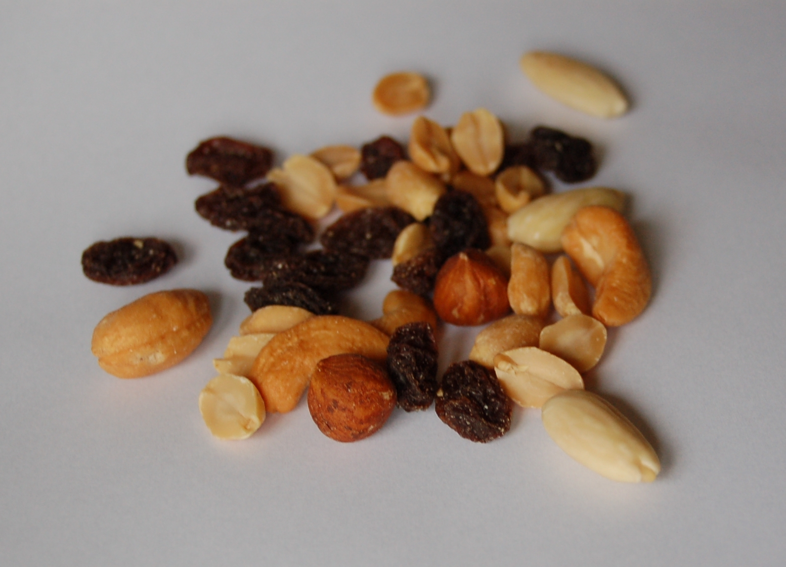 Studentenfutter bestehend aus Rosinen, Erdnüssen, Cashewkernen, Mandeln und Haselnüssen